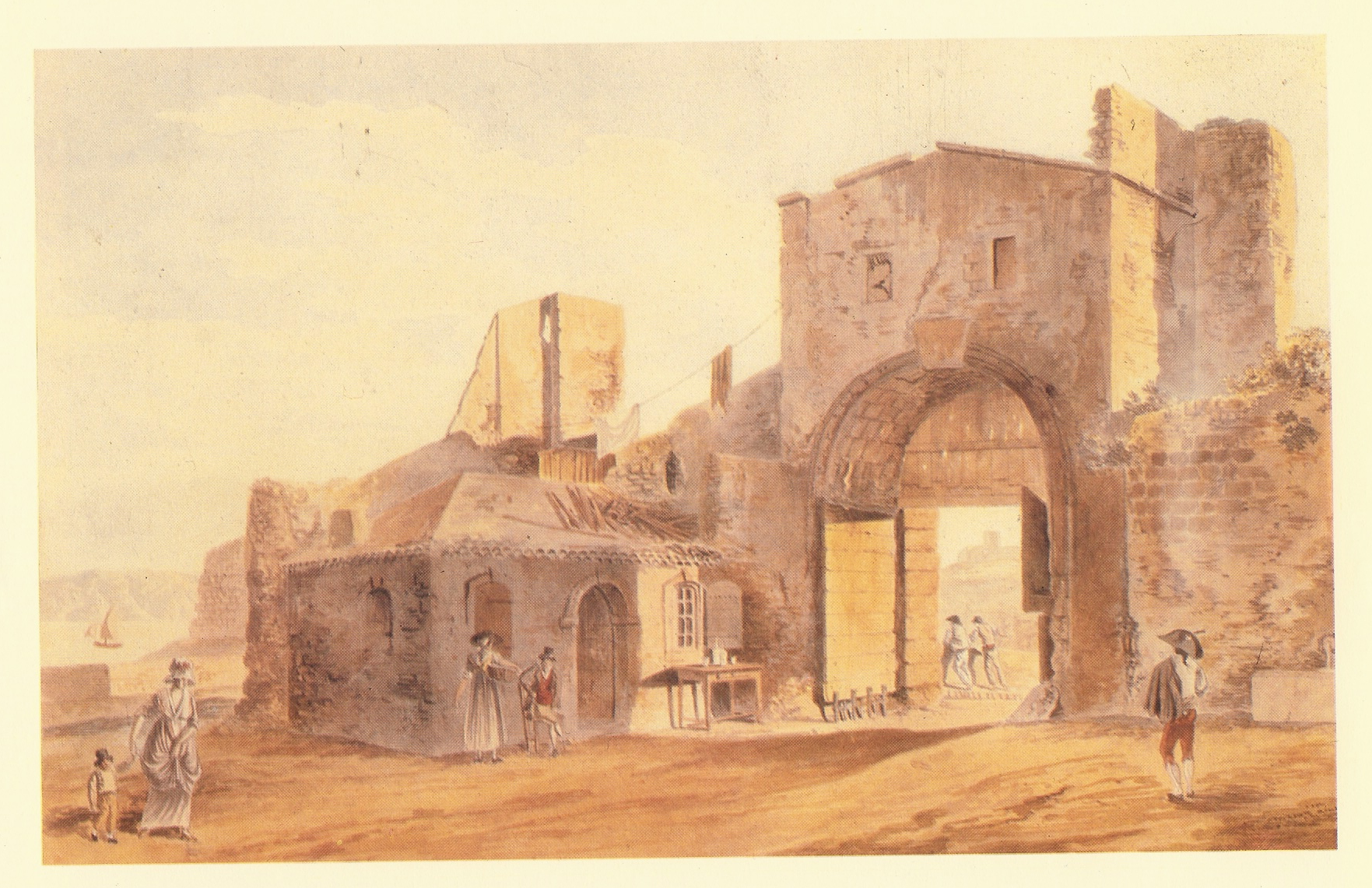 Porte de la Joliette à Marseille, en 1809 Aquarelle de 25x35cm par Jean-Jérôme Baugean - Musée du Vieux-Marseille